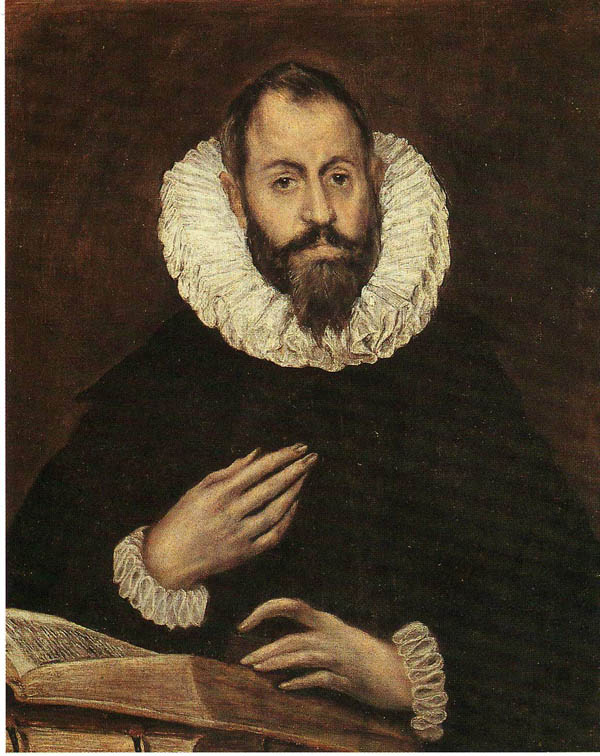 Portrait d'homme de Dhomenikos Théotokopoulos dit El Greco, vers 1600-1610, Musée de Picardie, Amiens, France.